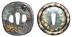 Japanische Tsuba. Links: 18. Jahrhundert, mit Öffnungen für Kozuka und Kogai, aus Eisen mit Einlegearbeiten aus Gold. Rechts: 16. Jahrhundert, Eisen mit Gold-Dekor.